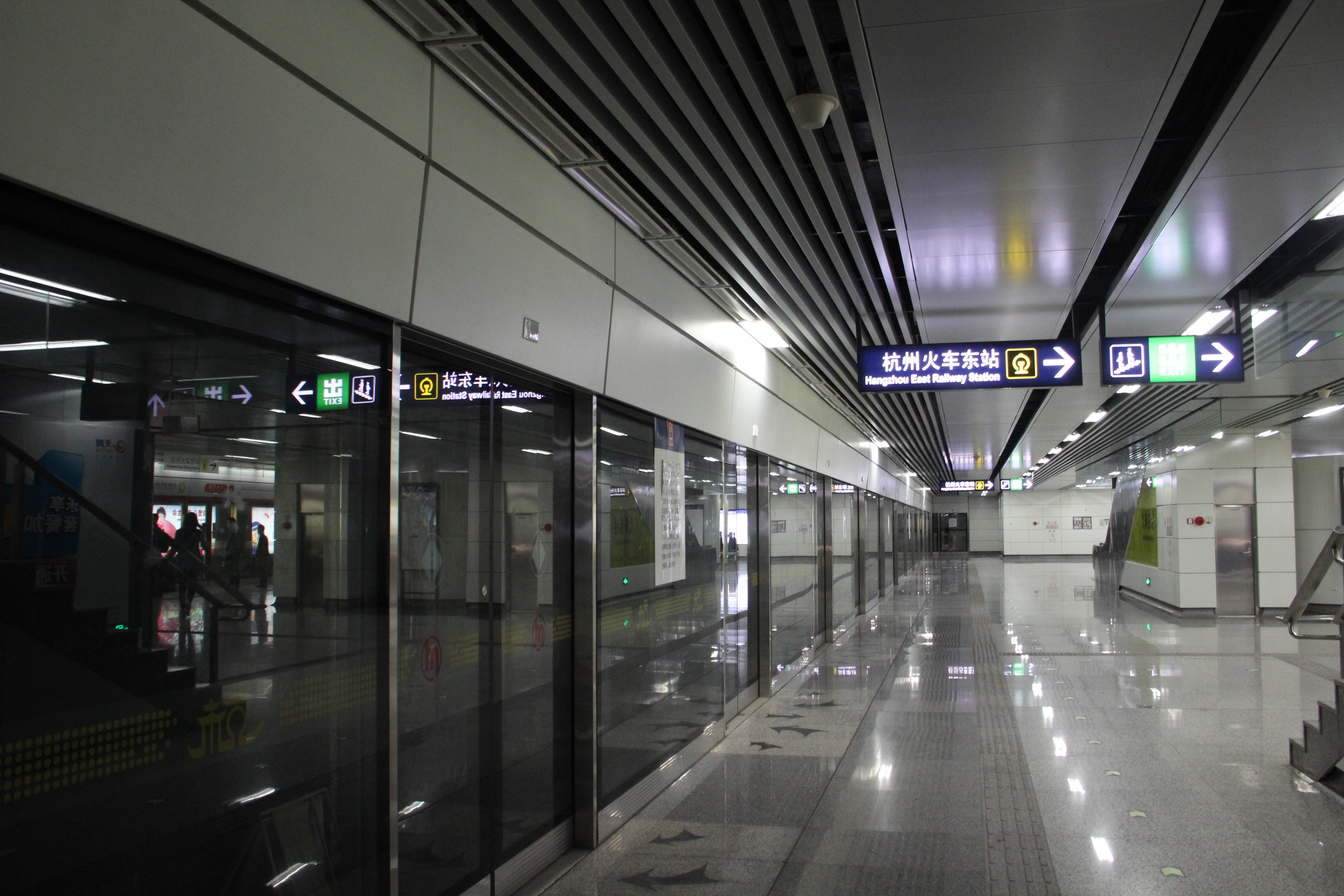 火车东站站4号线预留站台